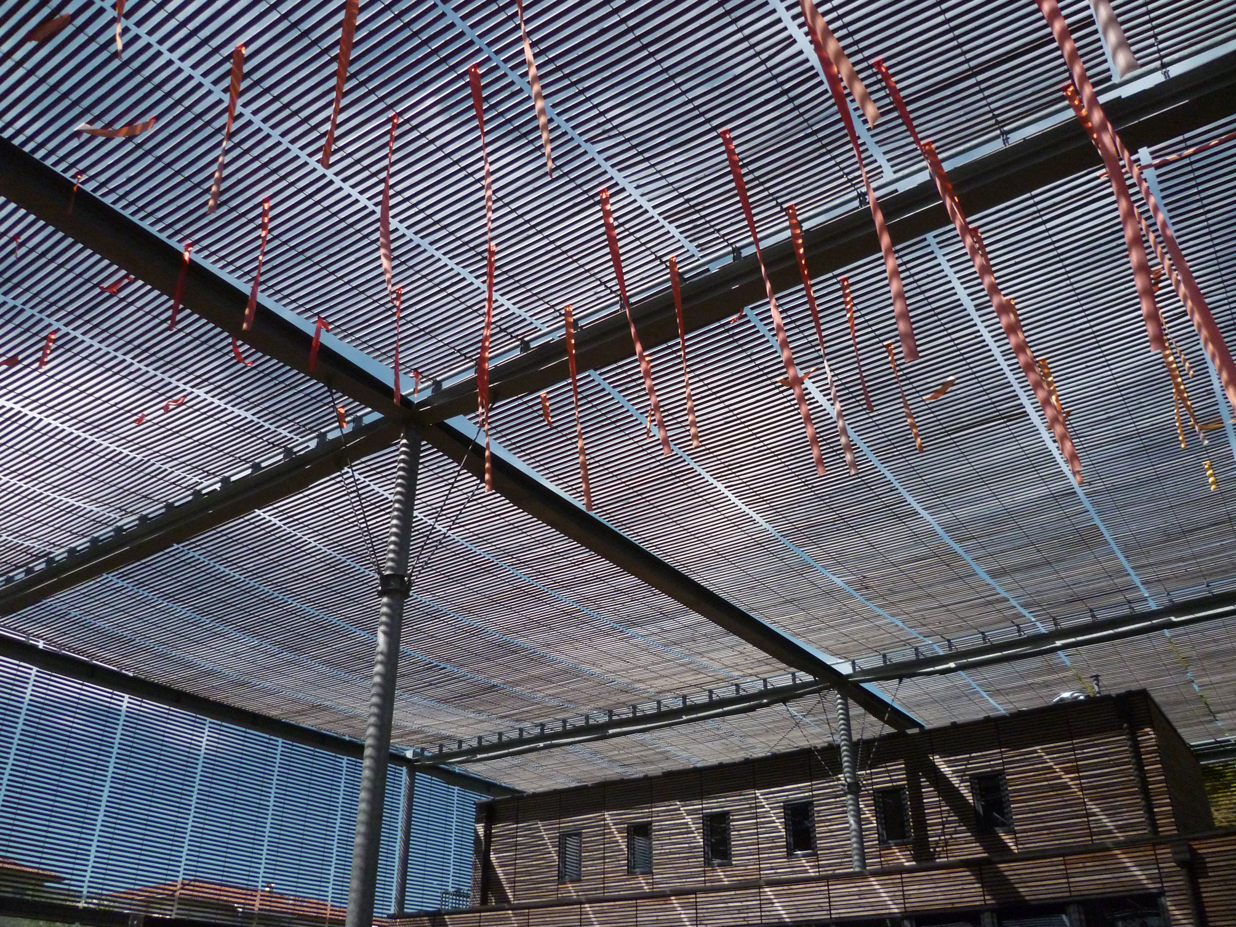 Toulouse (Haute-Garonne, France) : L'ombrière des Jardins du Muséum.